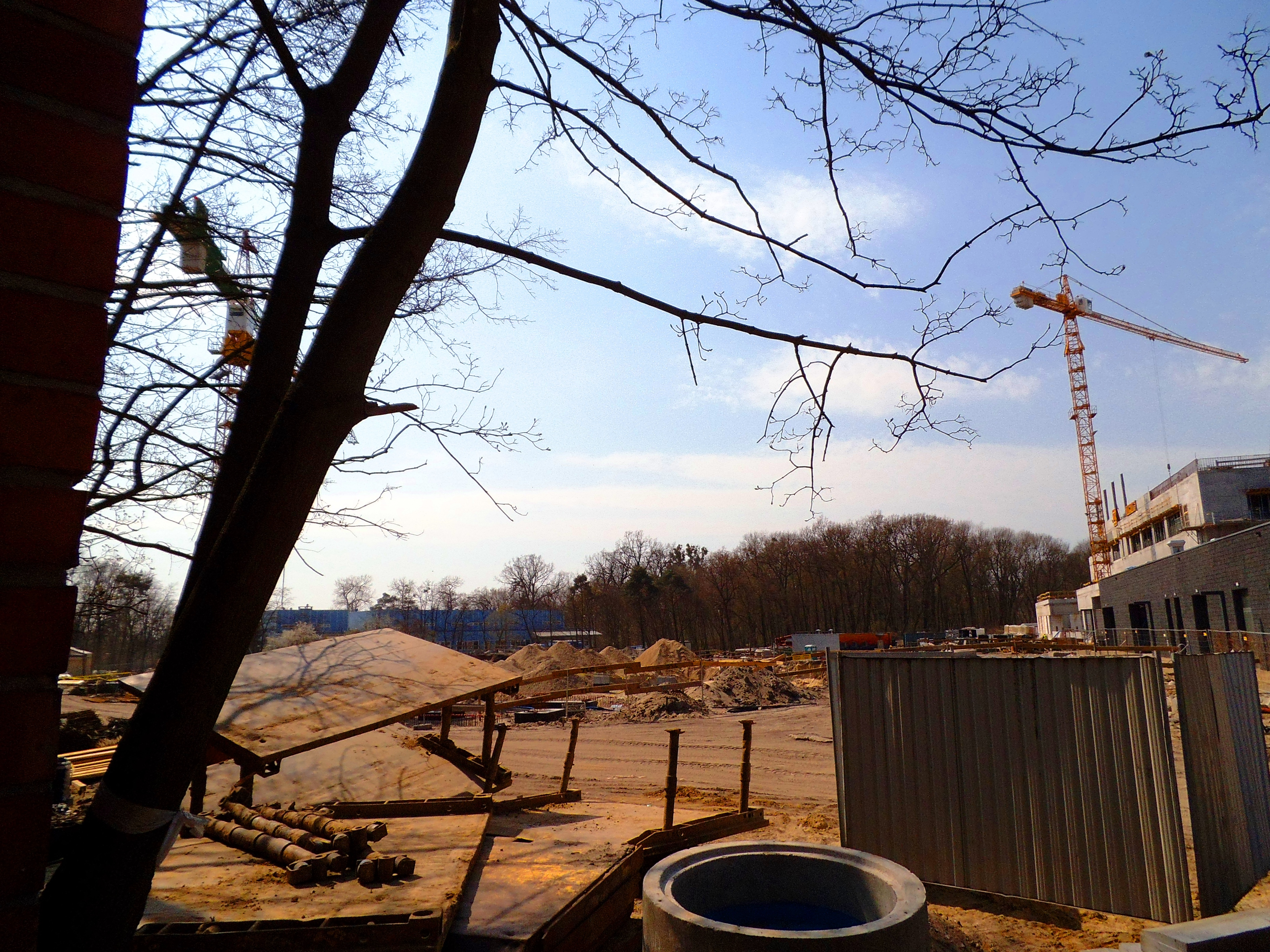 Budowa Szpitala Psychiatrycznego w Toruniu, kwiecień 2018 rok